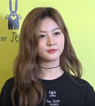 13일 오전 서울 명동 눈스퀘어점에서 열린 라이프스타일 브랜드 피터젠슨 오픈 행사에 배우 김새론이 참석하고 있다.